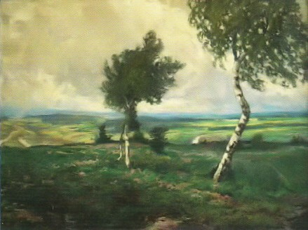 Česky: Z okolí Jindřichova Hradce